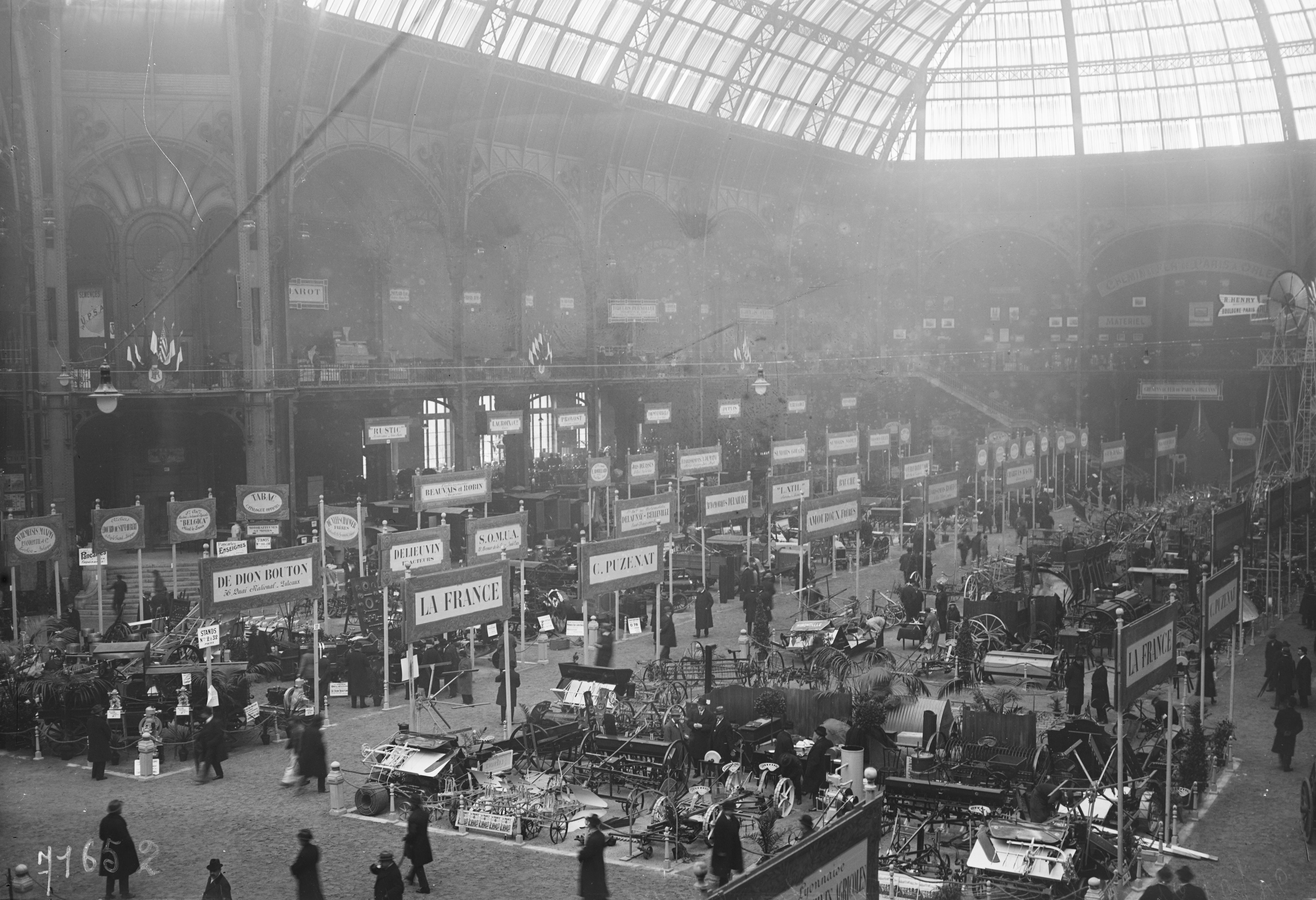 Salon de la machine agricole au Grand-Palais à Paris, photo de l'agence Rol en 1922